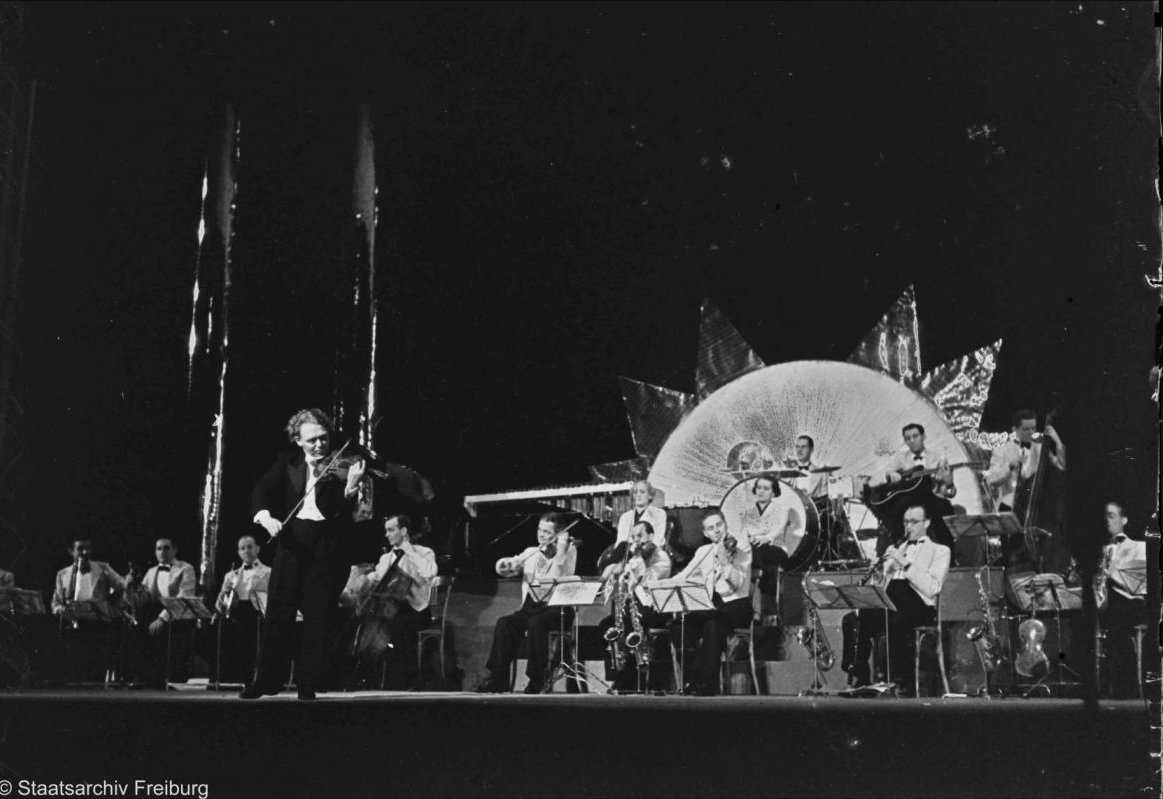 Scala (Berlin): Bernhard Ette mit Orchester